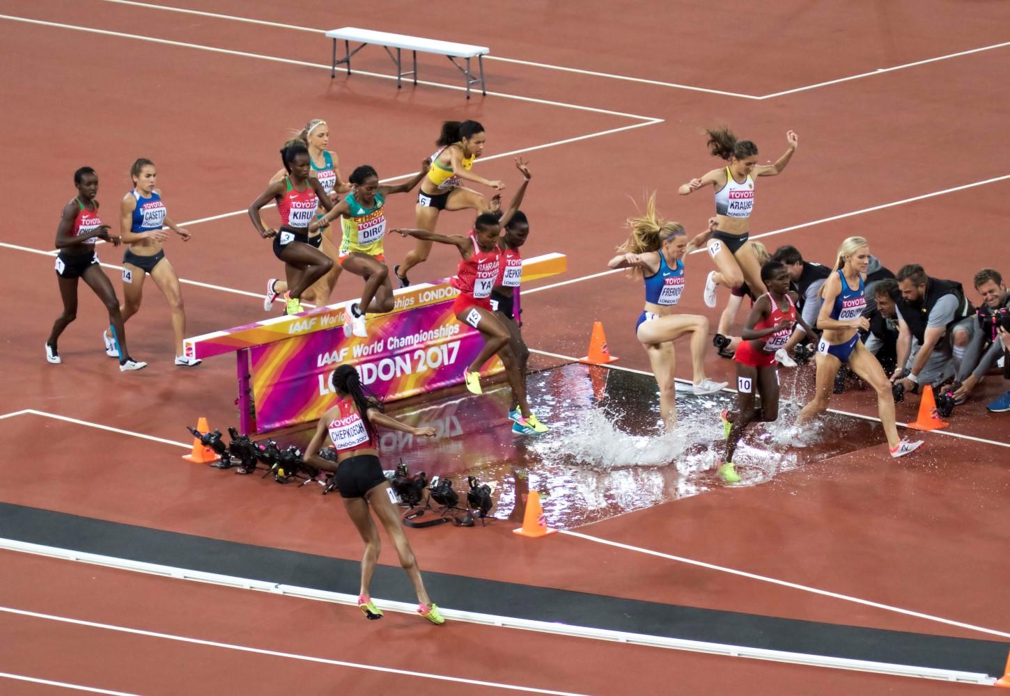 d7_24 3000mst dames finale